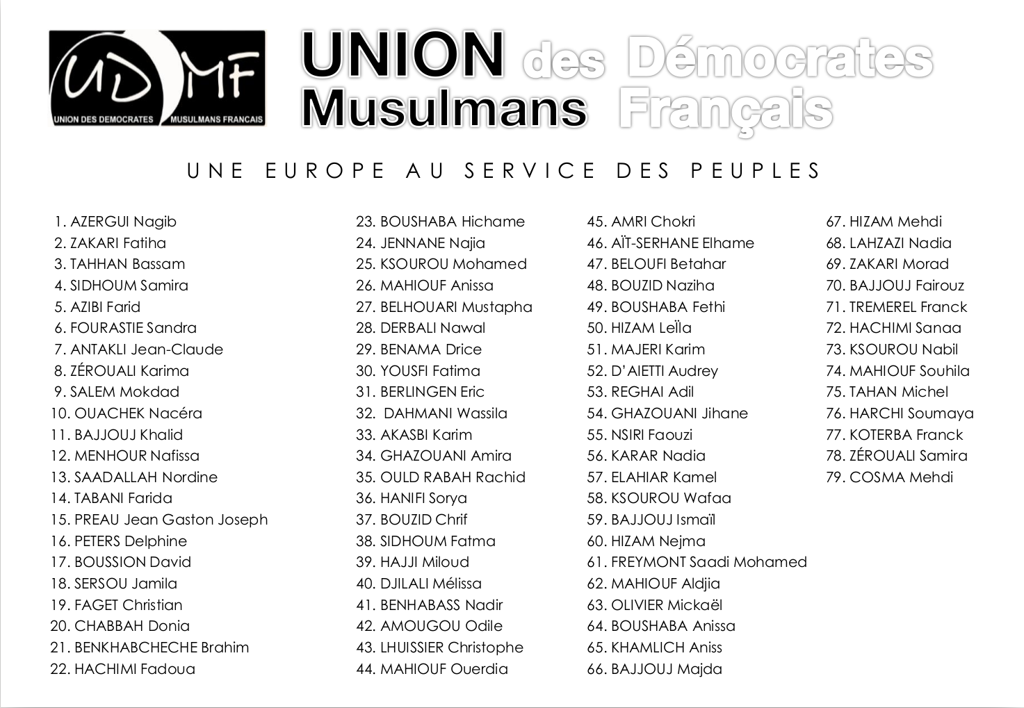 Bulletin de vote de l'UDMF pour les élections européennes de 2019 en France.